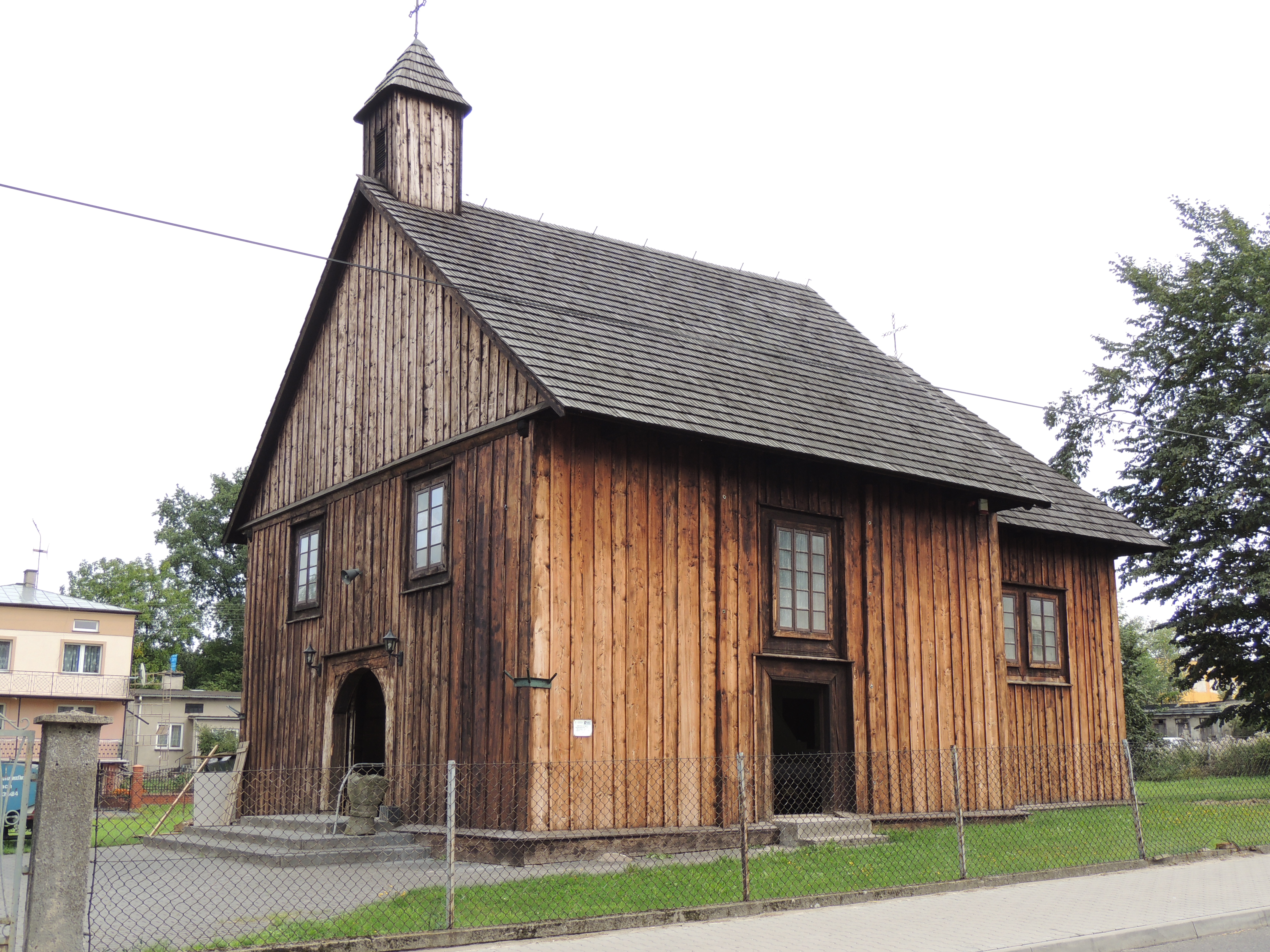 Zespół kościoła filialnego pw. św. Anny, w tym: kościół drewniany, 1719, zakrystia z pocz. XVII w., nr 6-I-6, 6 dzwonnica drewniana, XVIII w., nr 373 ul. Św. Anny 43, Brzeziny, miasto